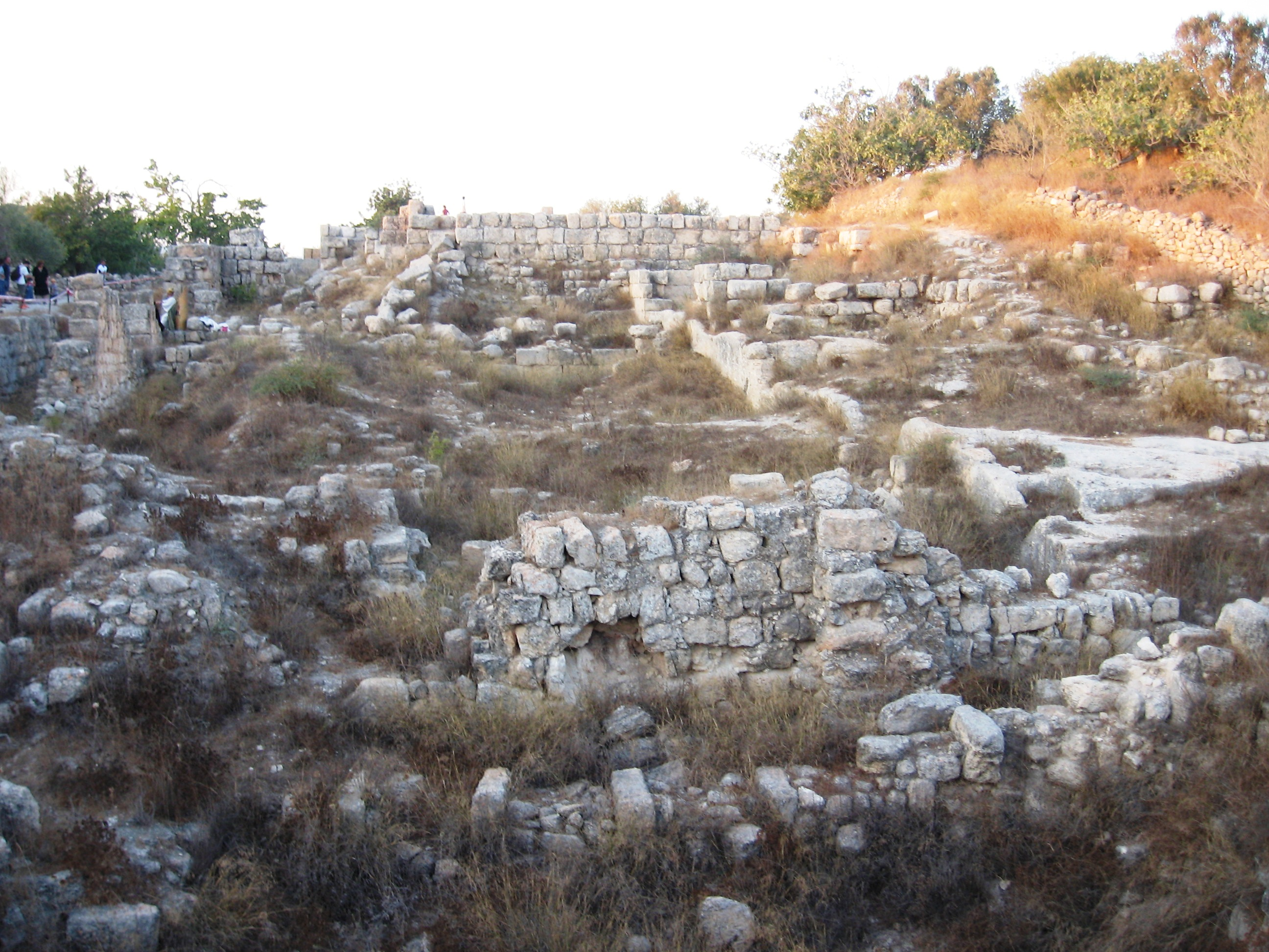 מבט על ארמון אחאב לאורך בחלק העליון